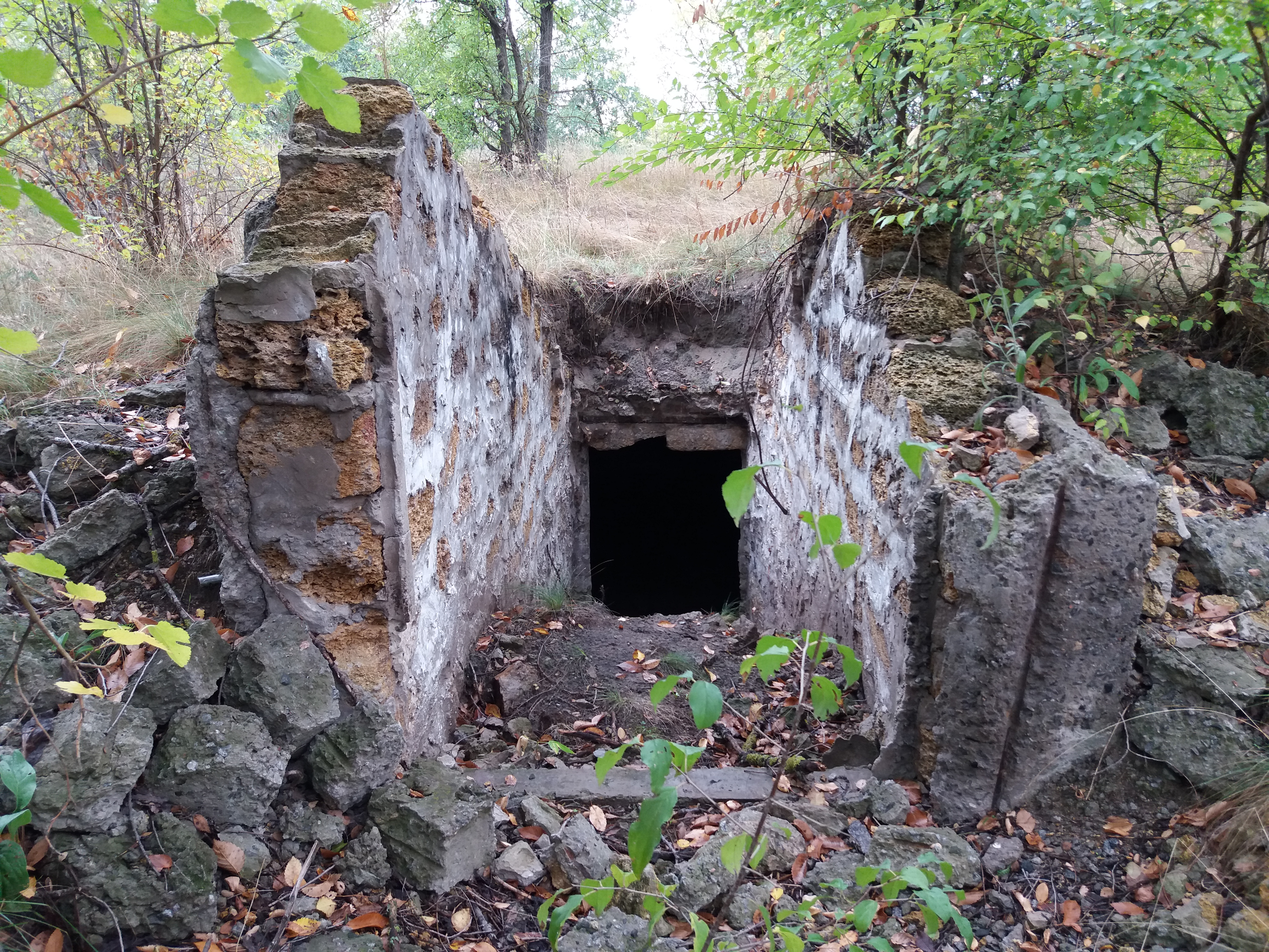 Руїни льоху колишнього панського маєтку в селі Стара Білецьківка Кременчуцького району Полтавської області